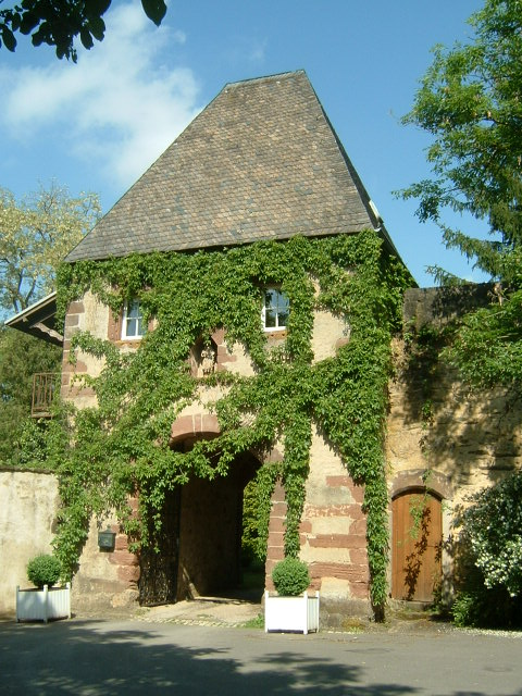 Roth an der Our, Schloss Roth, Ehemalige Komturei, 1733 erneuert, 1958 weideraufgebaut